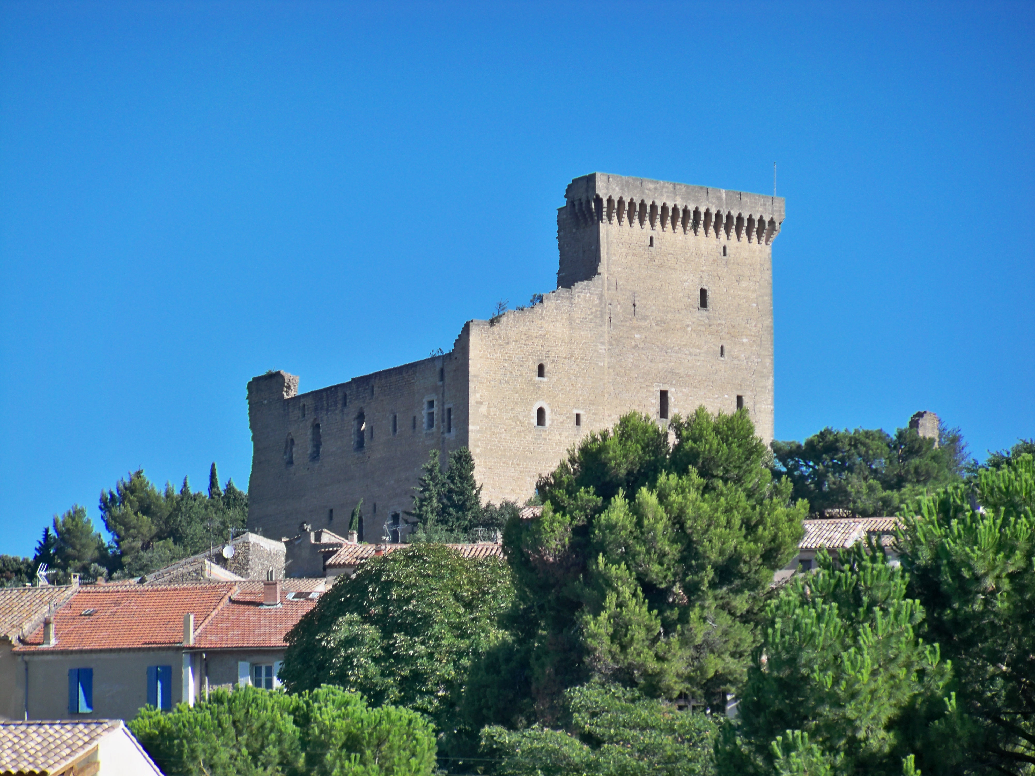 Chateau de Chateauneuf du Pape, Vaucluse, France